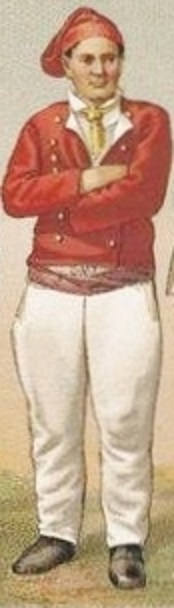 Costume de travail de Plougastel-Daoulas : chemise en laine, gilet et veste en drap, pantalon en toile, ceinture et gilet en laine.